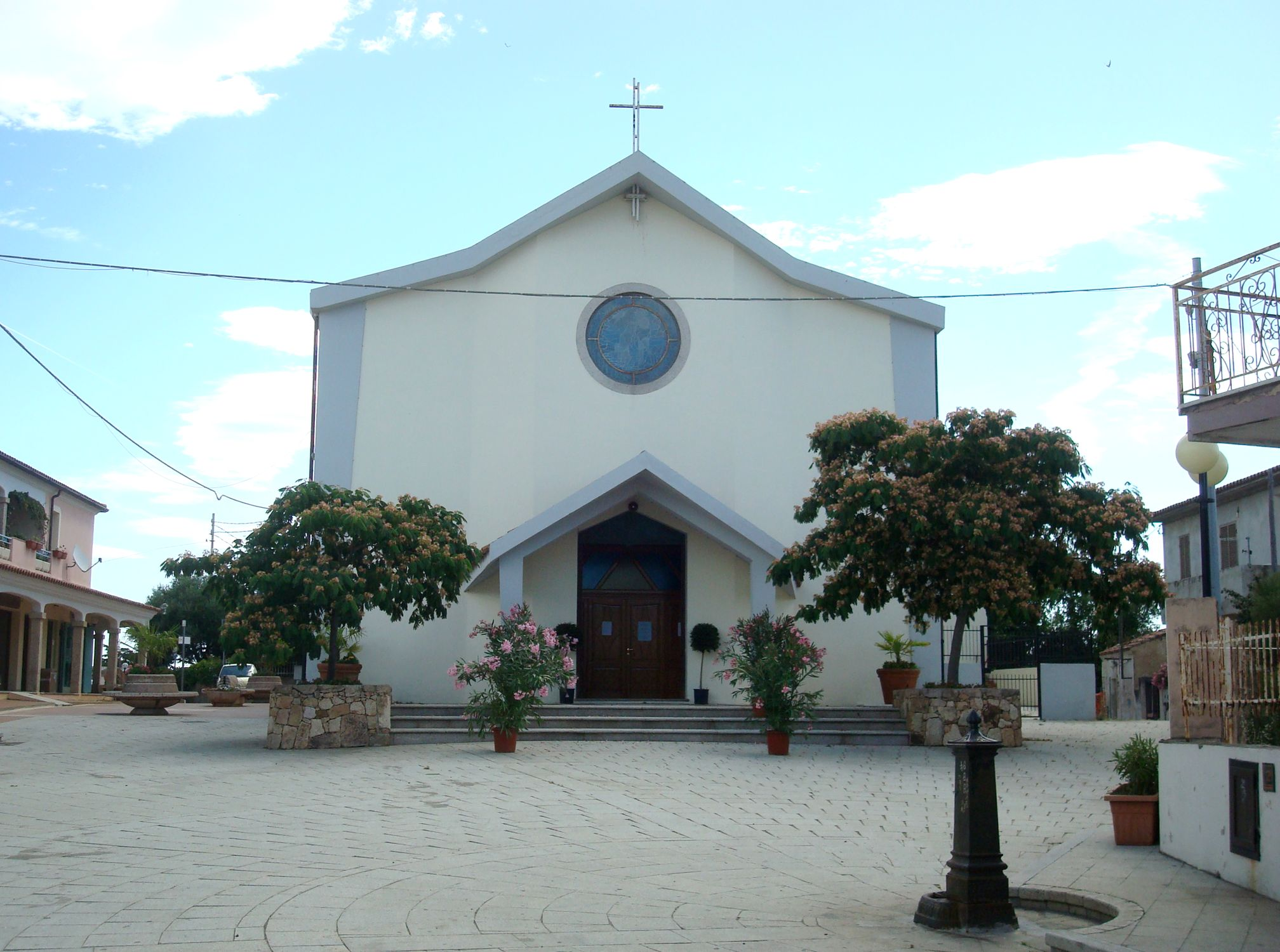 Chiesa parrocchiale di San Giovanni Battista a Budoni.